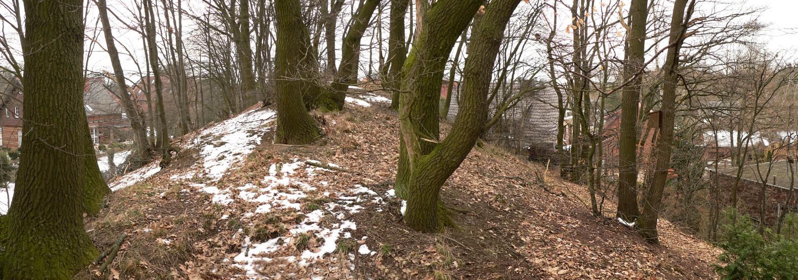 Wall der Scheverlingenburg in Walle (Schwülper)